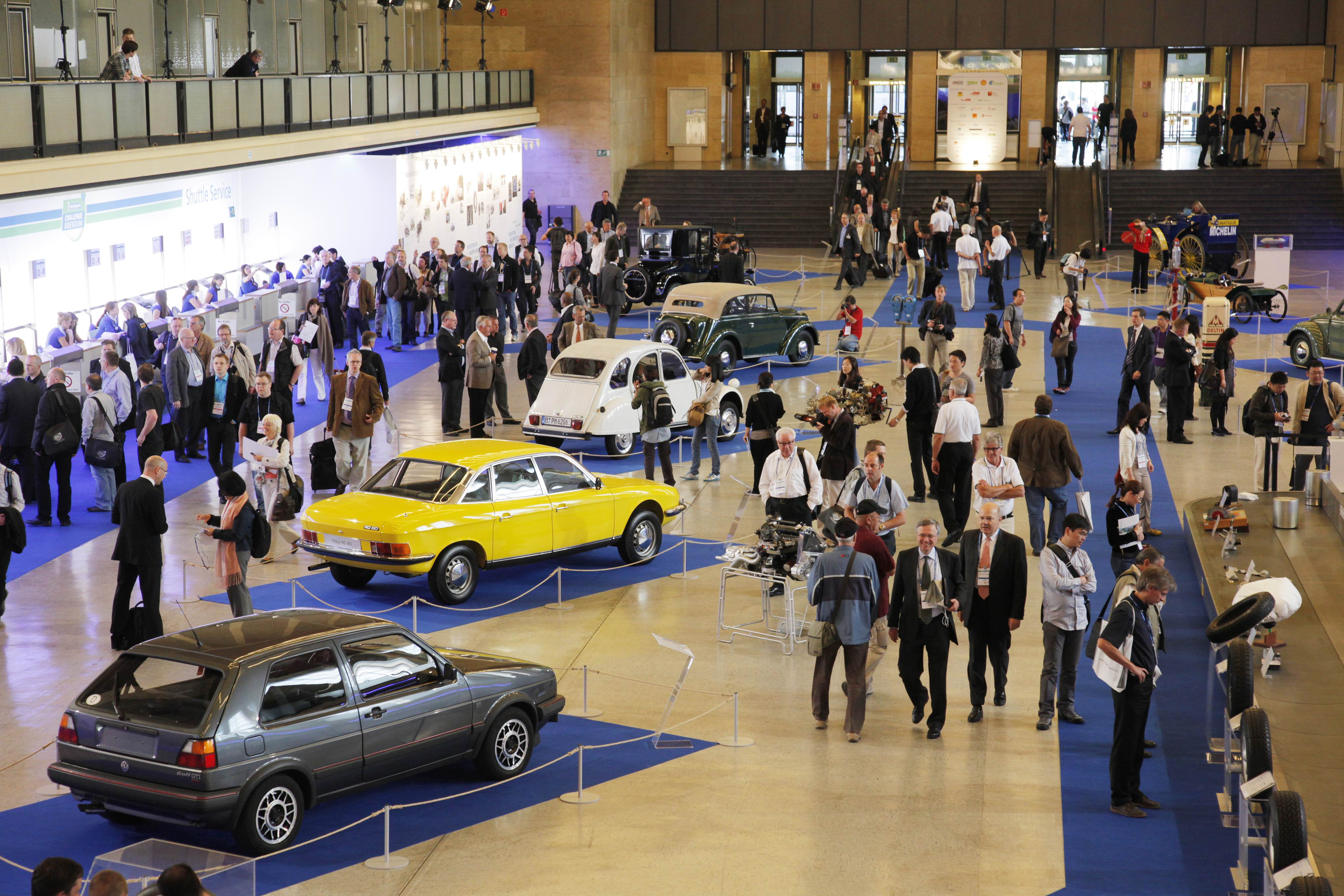 Anmeldebereich für Besucher und Ausstellung "125 Jahre Automobilgeschichte", Michelin Challenge Bibendum 2011